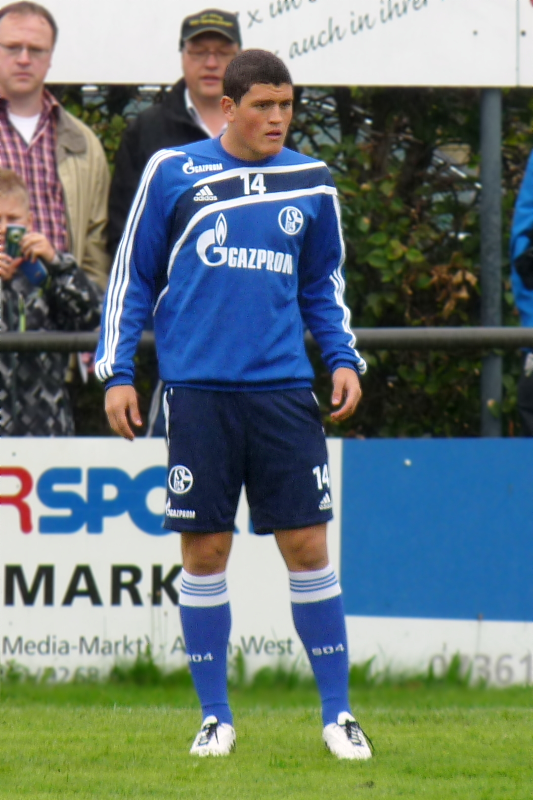 Kyriakos Papadopoulos